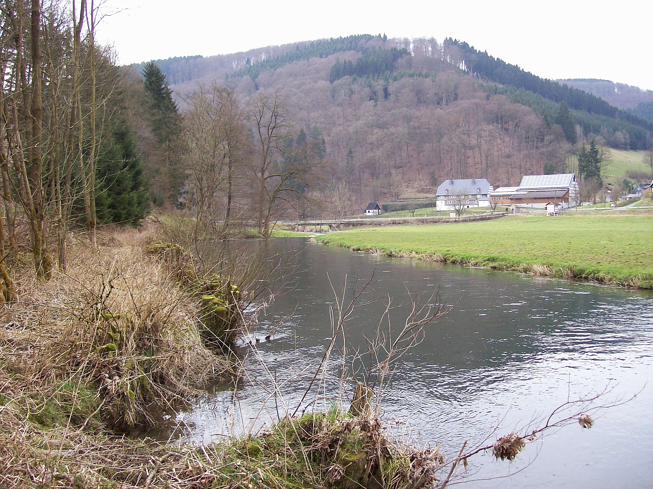 Lenne (Fluss) in Schmallenberg-Hundesossen (Germany)